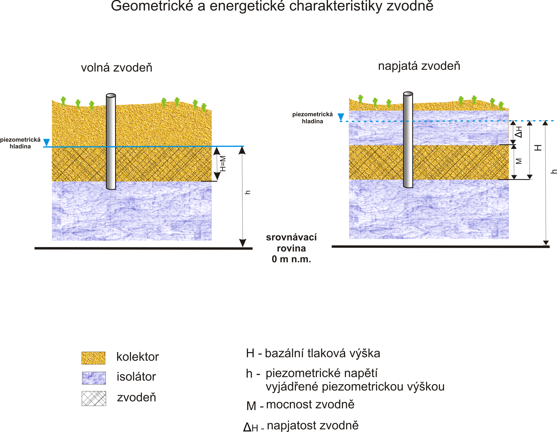 Geometrické a energetické charakteristiky zvodn